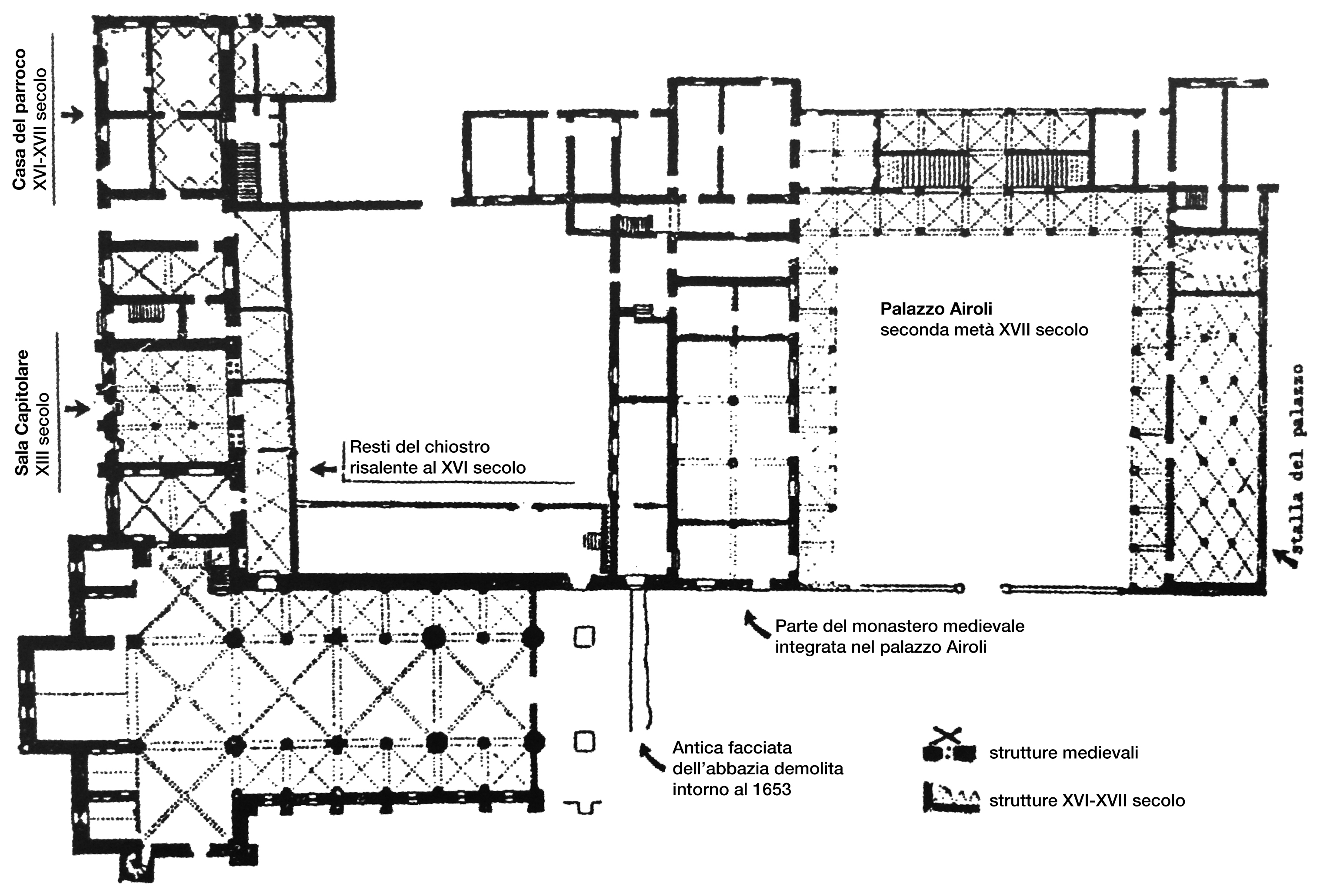 Pianta del complesso monumentale dell'abbazia di Rivalta Scrivia. Rilievo di Pietro Molli, inizio XX secolo.